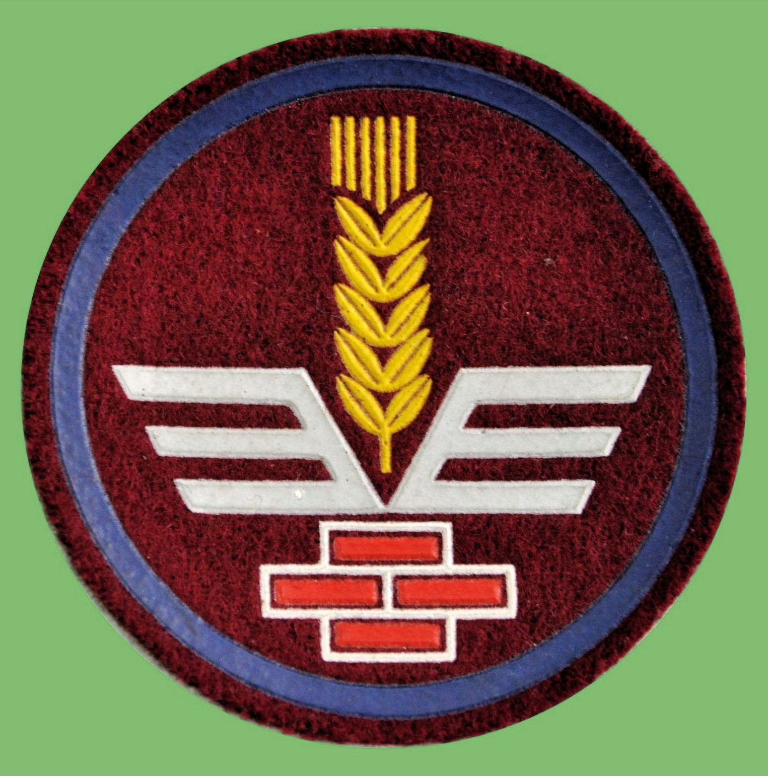 Oznaka służb kwaterm